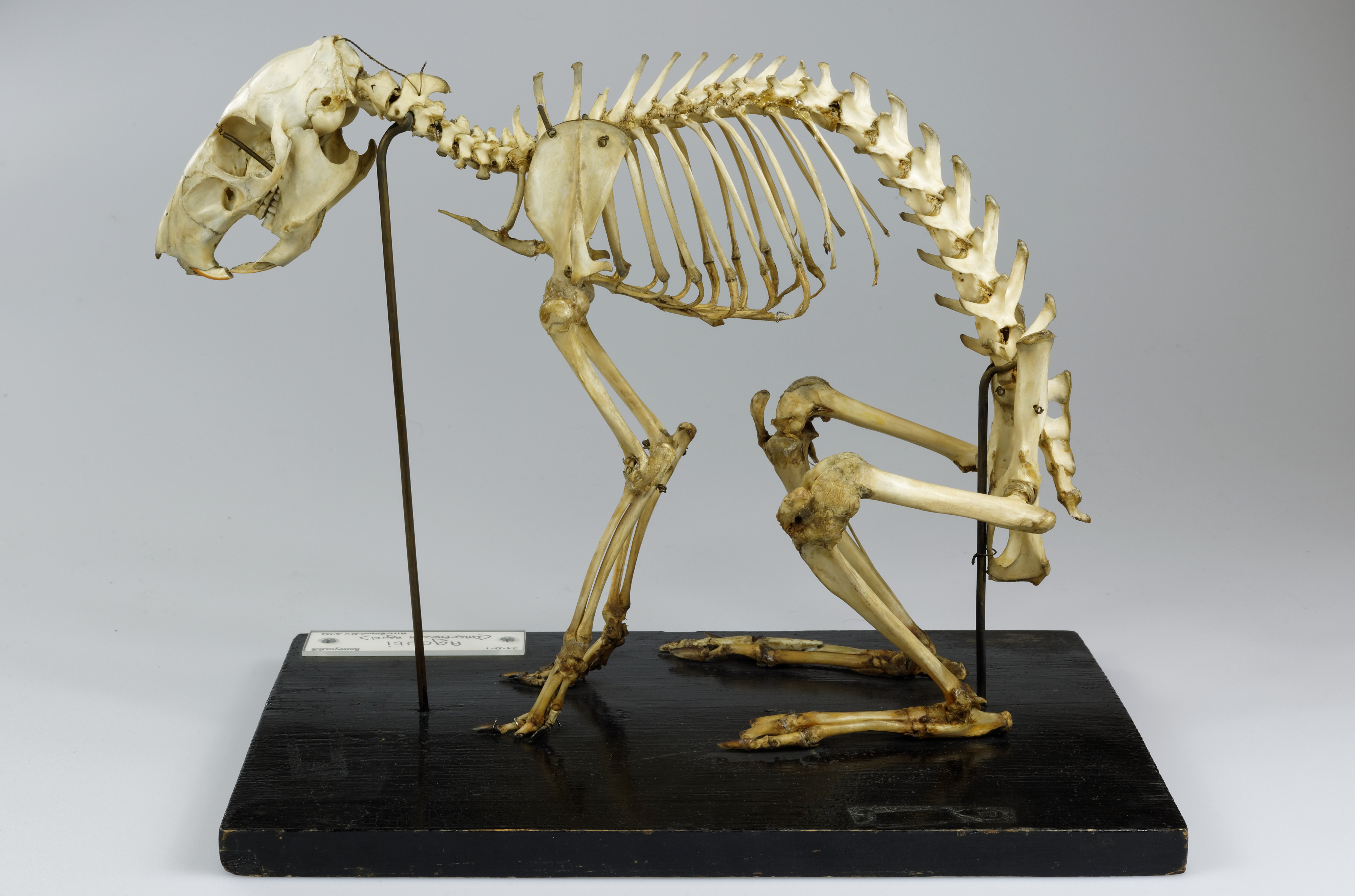 Un agouti - Dasyprocta aguti - de la collection de l'Université Pierre-et-Marie-Curie à Paris.